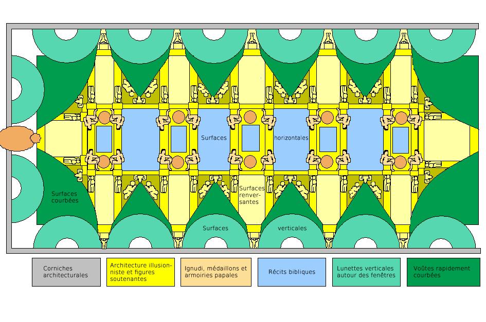 Schéma du plafond de la chapelle Sixtine (Vatican).